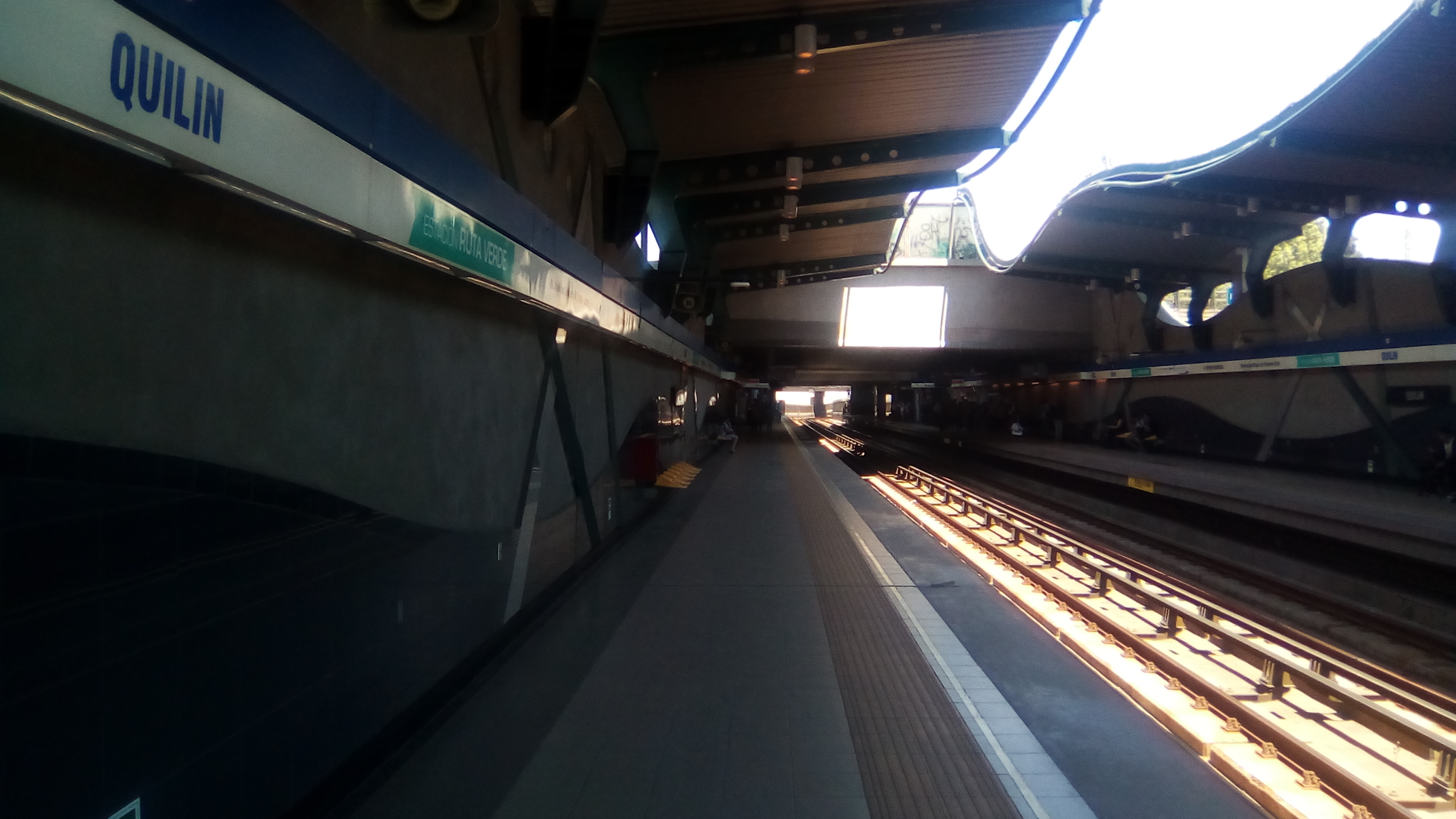 Estación Quilín (2018)